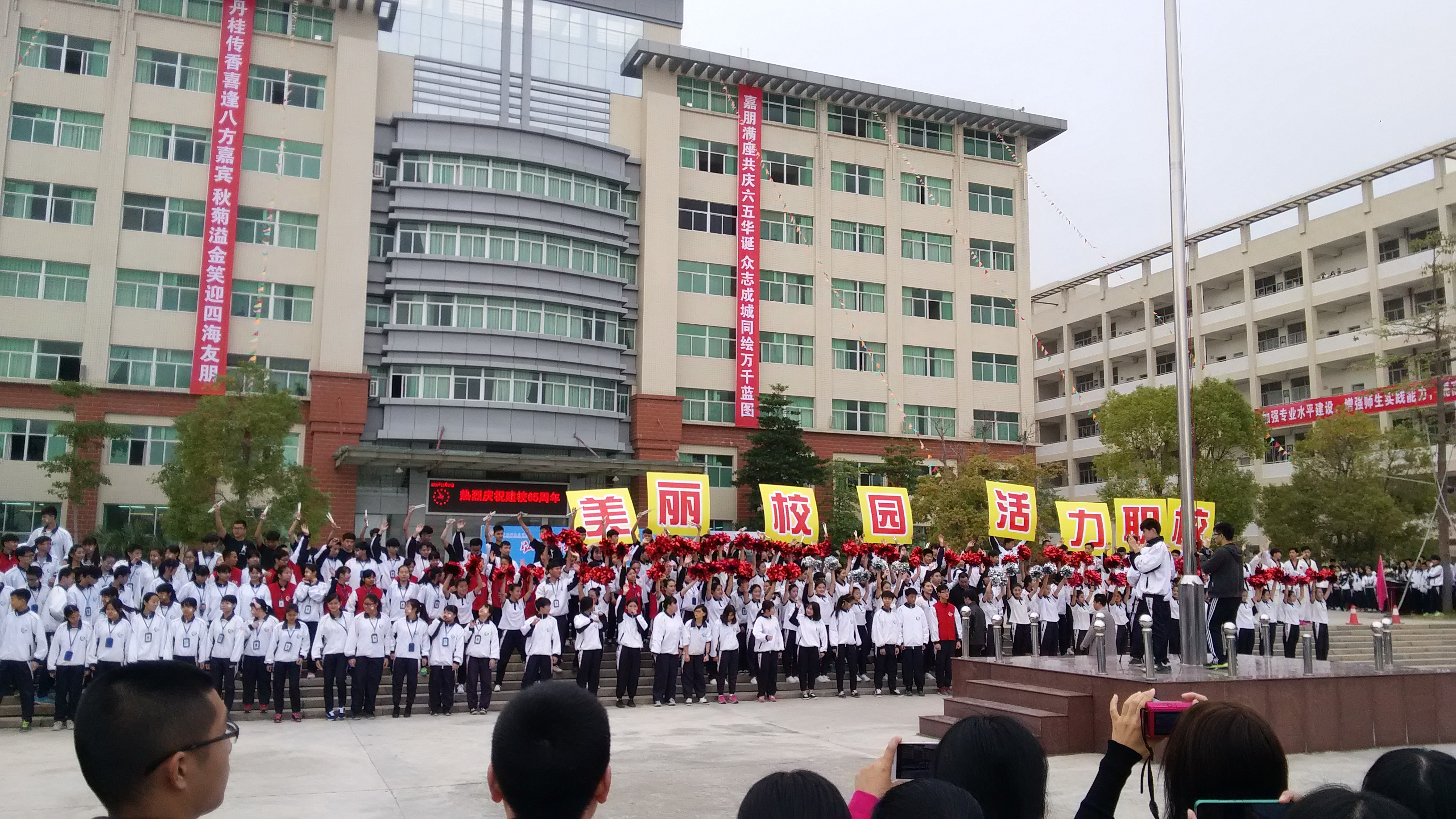 2015年12月7日上午，潮州市职业技术学校在校园广场举办建校65周年庆典，这是各社团在举办各自的表演后，在台阶进行大集合。